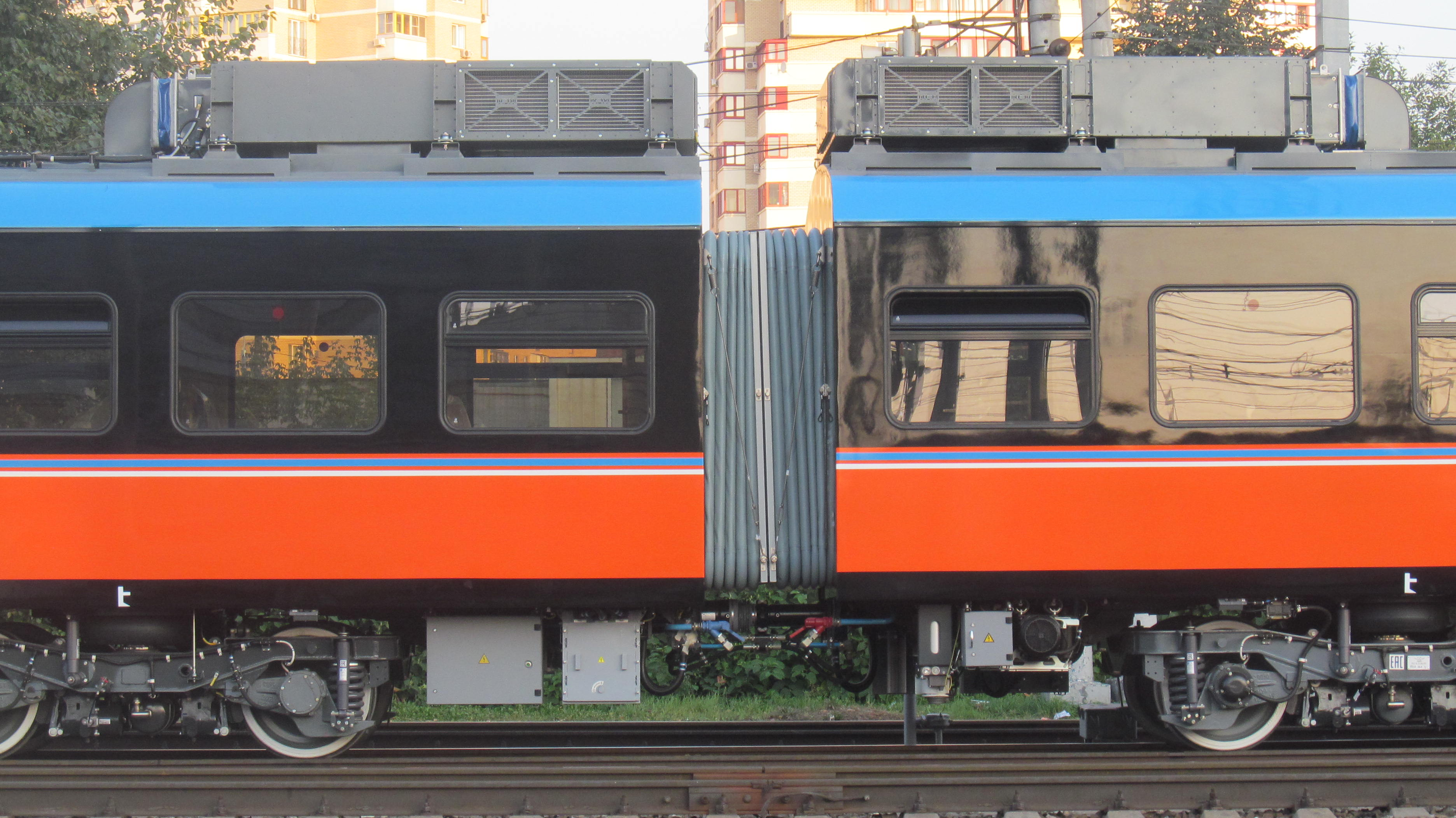 Межвагонный переход и установки кондиционирования на дизель-поезде РА3-002